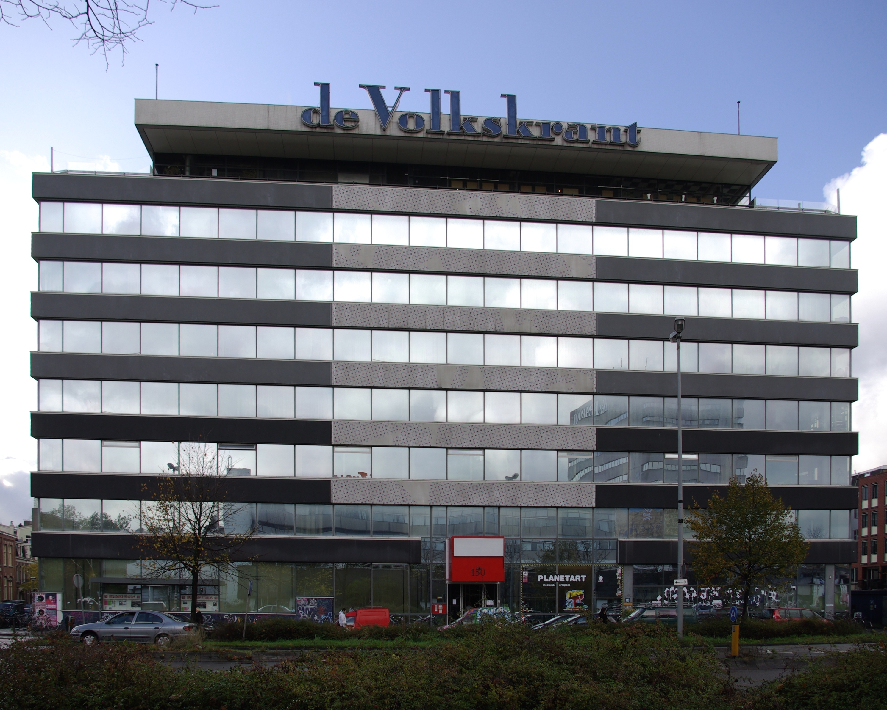 Ehemaliges Verlagsgebäude der Zeitung de Volkskrant in Amsterdam